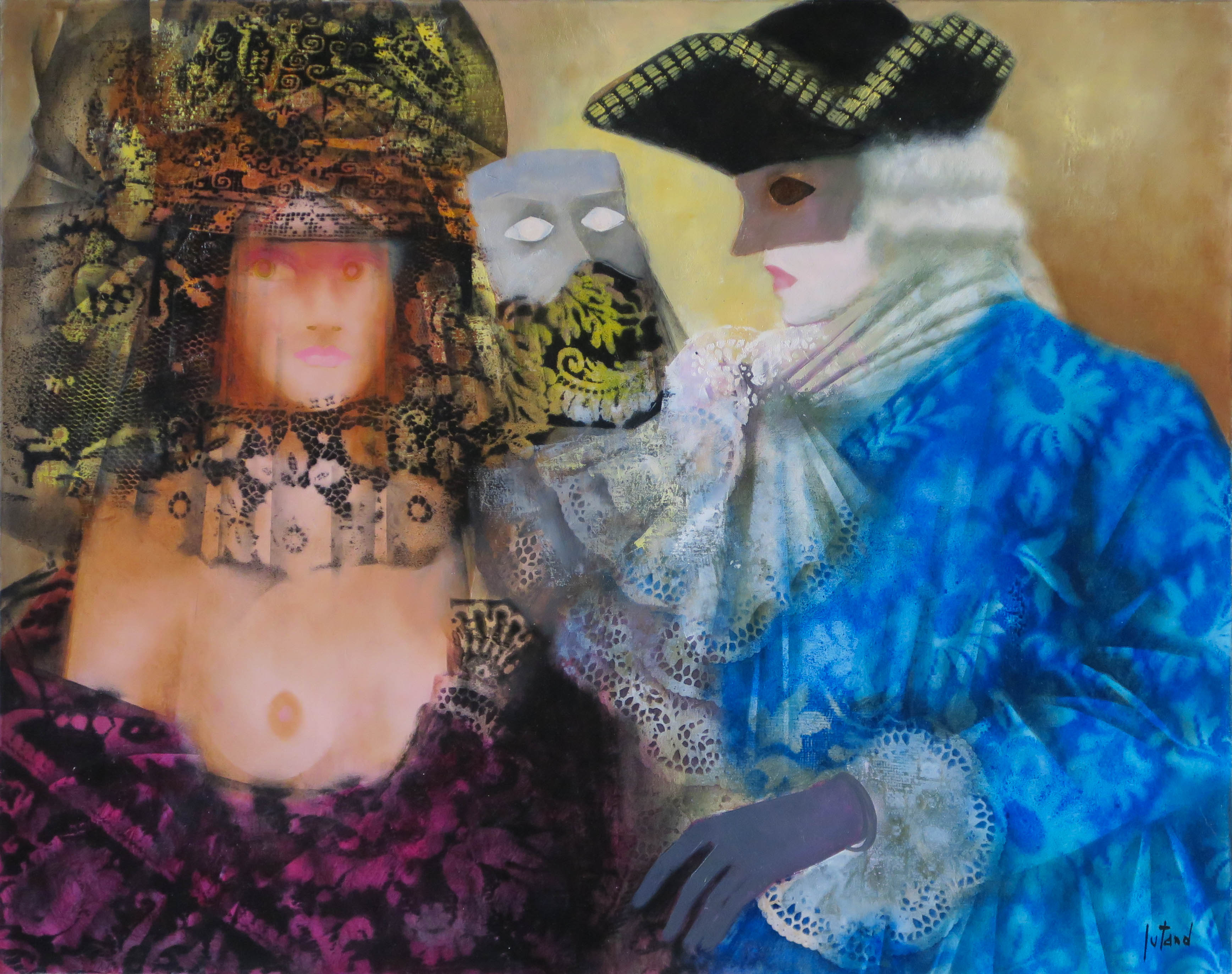 Tabeleau de Pierre Jutand